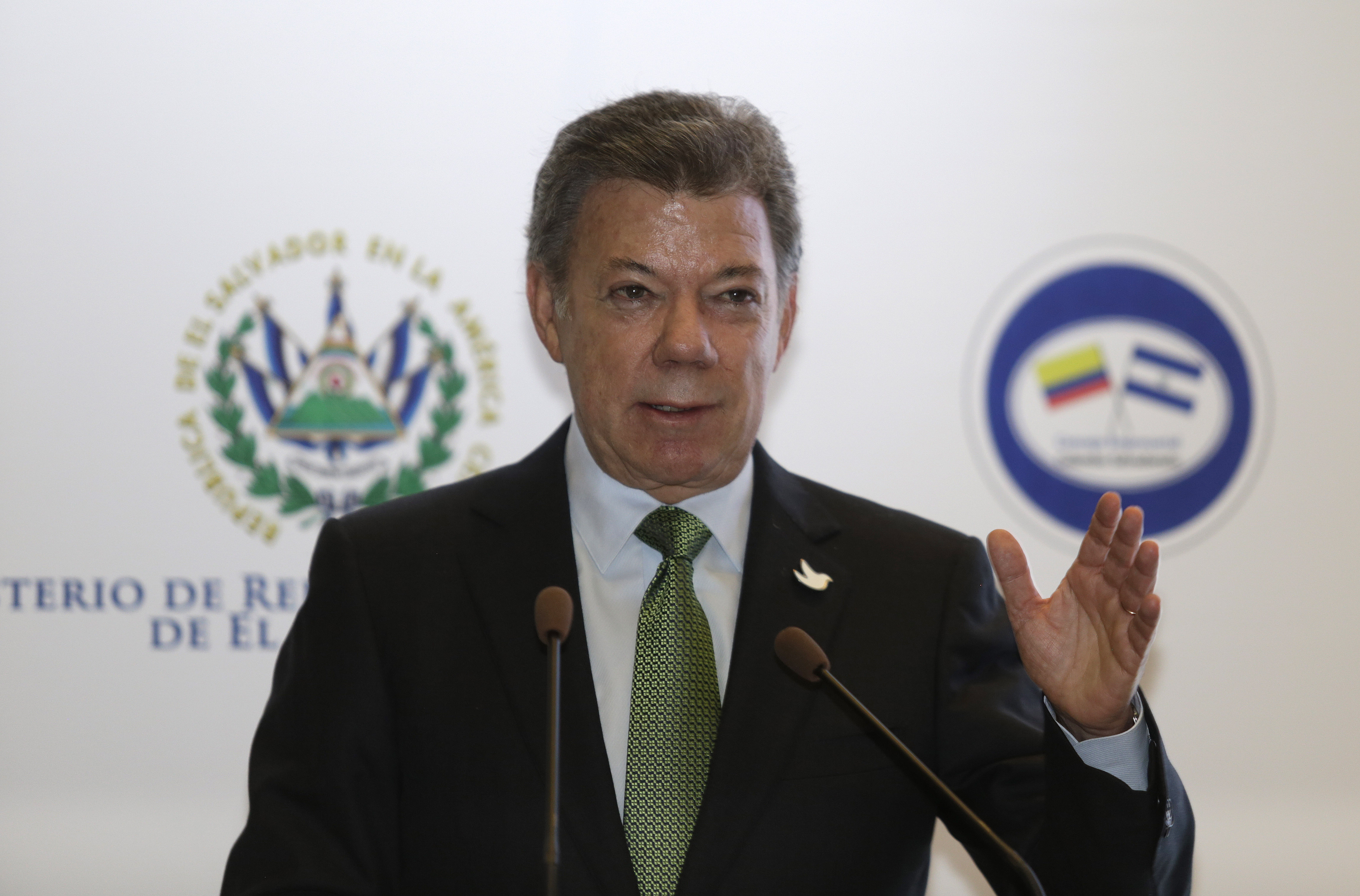 Presidente de Colombia Juan Manuel Santos.